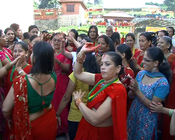 नेपाली: तीज नाचगान